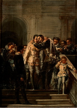 Boceto para el cuadro San Francisco de Borja despidiéndose de sus familiares en su palacio de Gandía para ingresar en la compañía de Jesús, óleo de Francisco de Goya. Pintado en el año 1788.